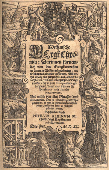 Petrus Albinus: Meisznische Land und Berg-Chronica, in welcher ein vollnstendige description des Landes … der dorinnen begriffenen … Bergwercken, sampt zugehörigen Metall un(d) Metallar beschreibungen …. Dresden, (G. Berg), 1589-1590